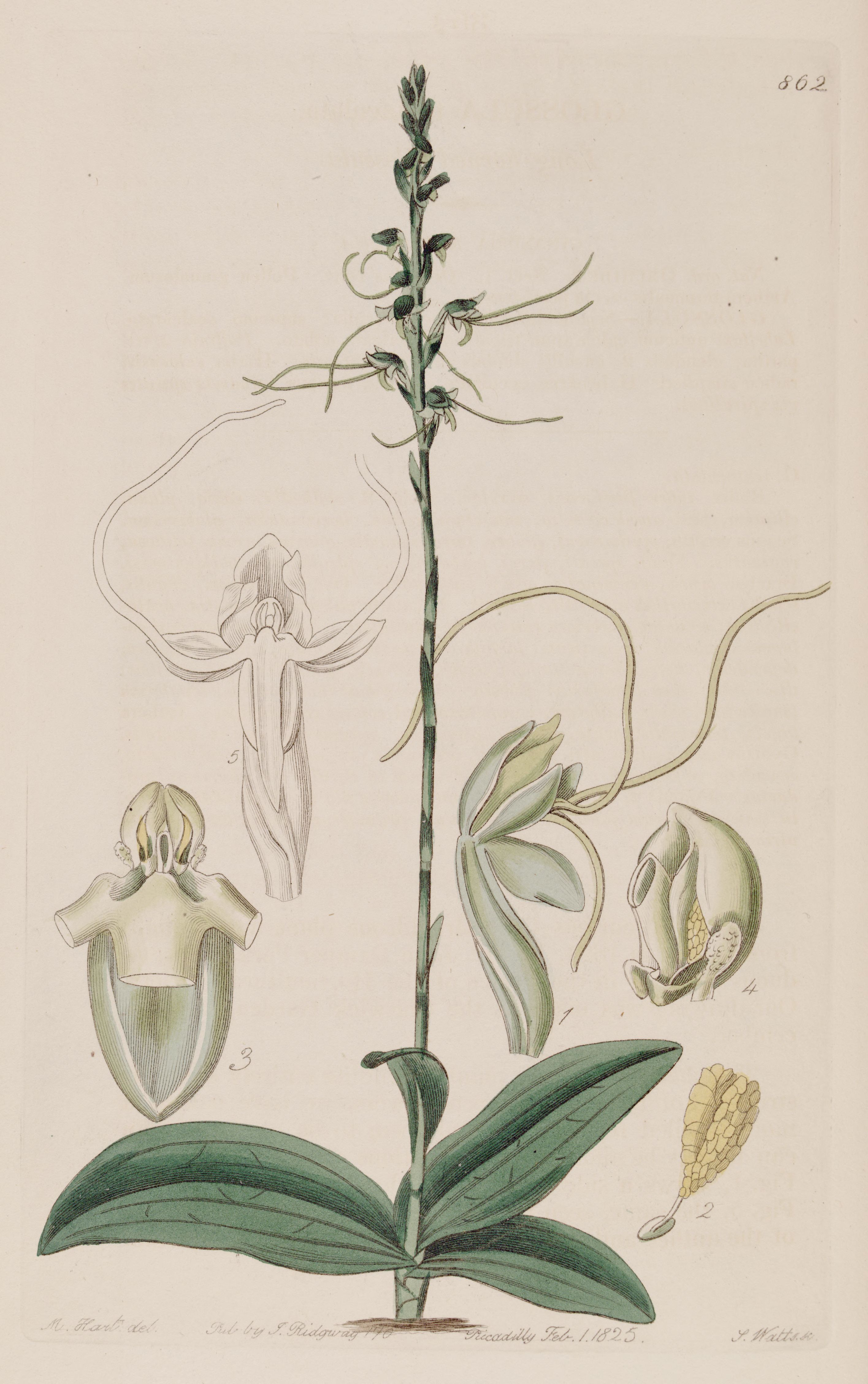 Illustration of Peristylus tentaculatus (as syn. Glossula tentaculata)